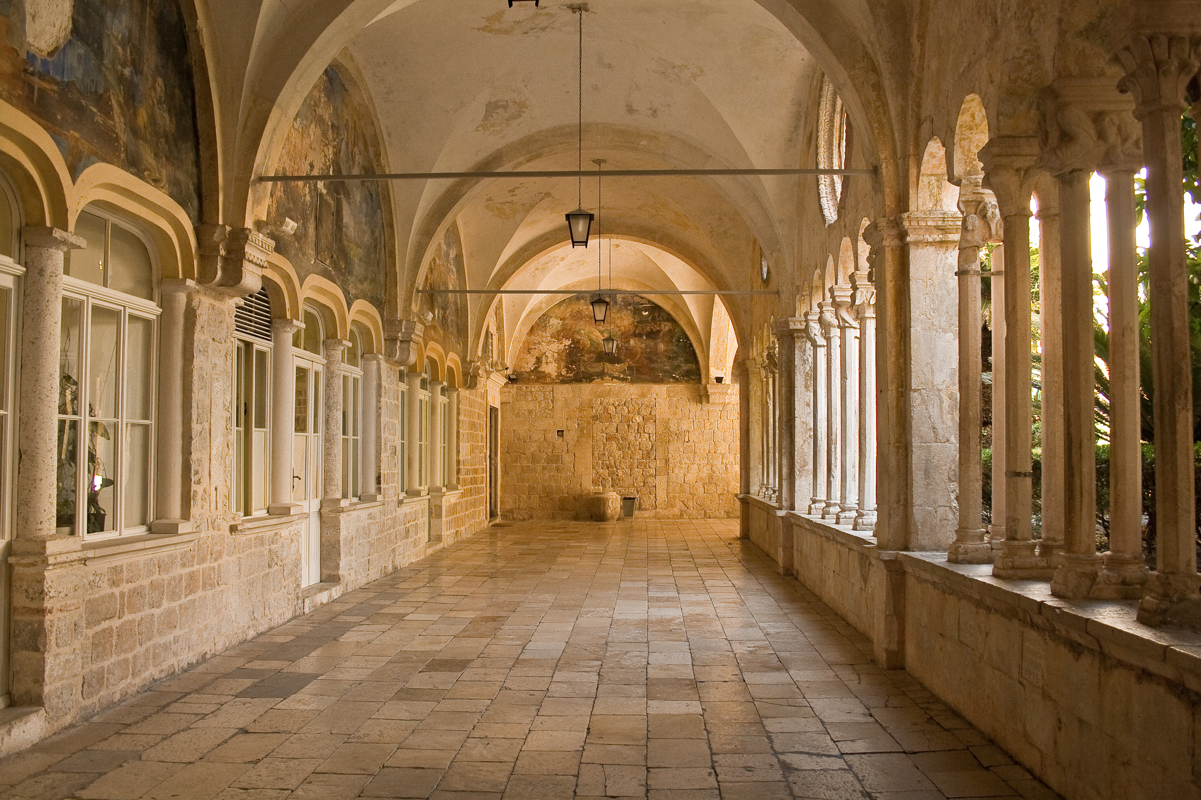 Dubrovnik,_Franziskanerkloster,_Innenansicht. links: Die Apotheke